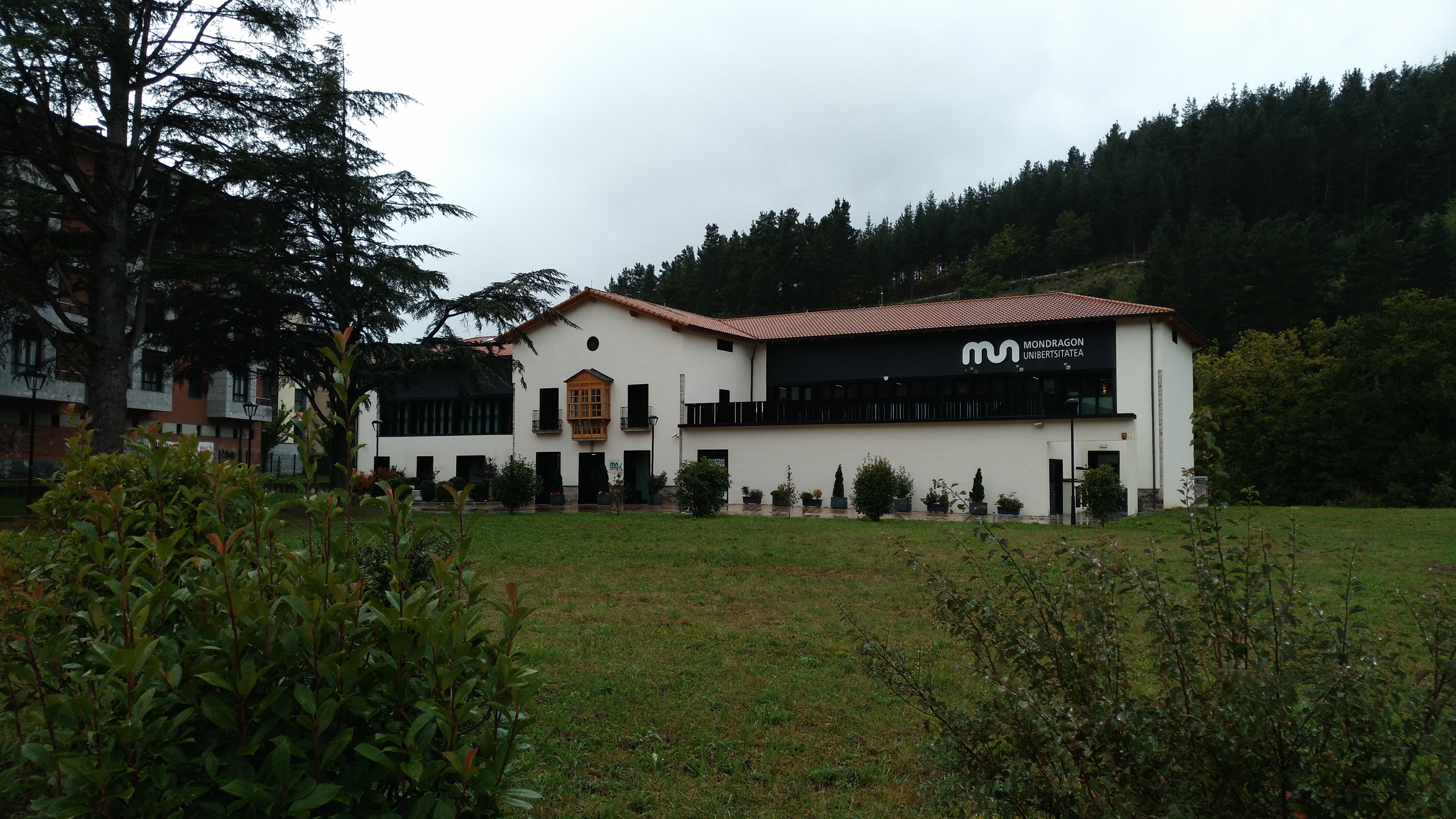 HUHEZIren Aretxabaletako eraikina